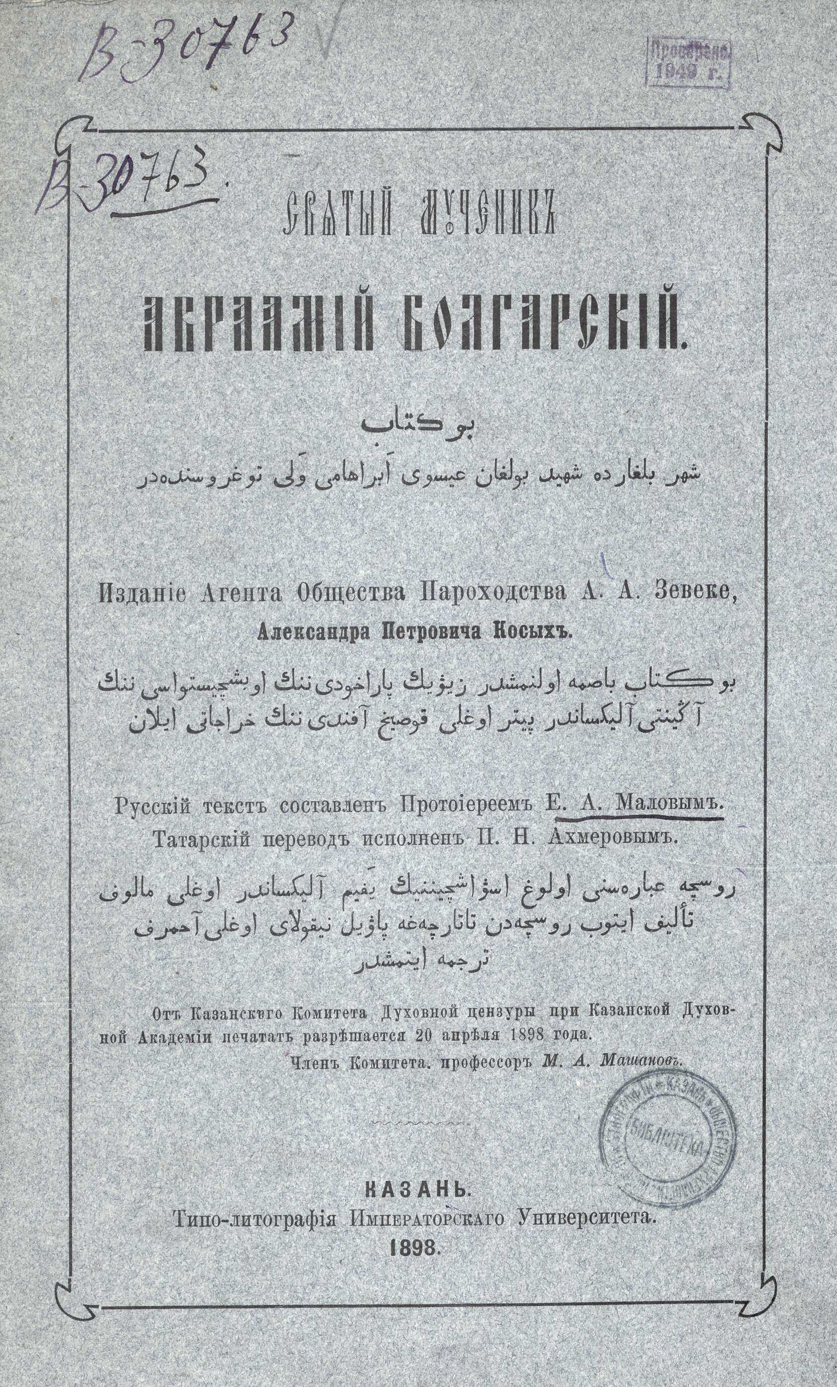 Обложка брошюры «Святый мученик Авраамий Болгарский» (Казань, 1898 г.) (См.: Малов Е.А. Святый мученик Авраамий Болгарский. – Казань: Типо-литография Императорского Университета, 1898. – Обложка.).